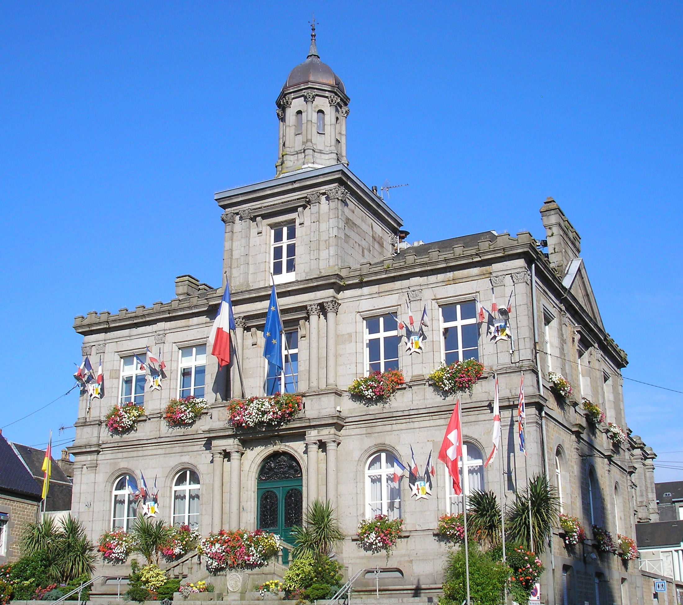 Hôtel de ville de Villedieu-les-Poêles (Normandie, France).